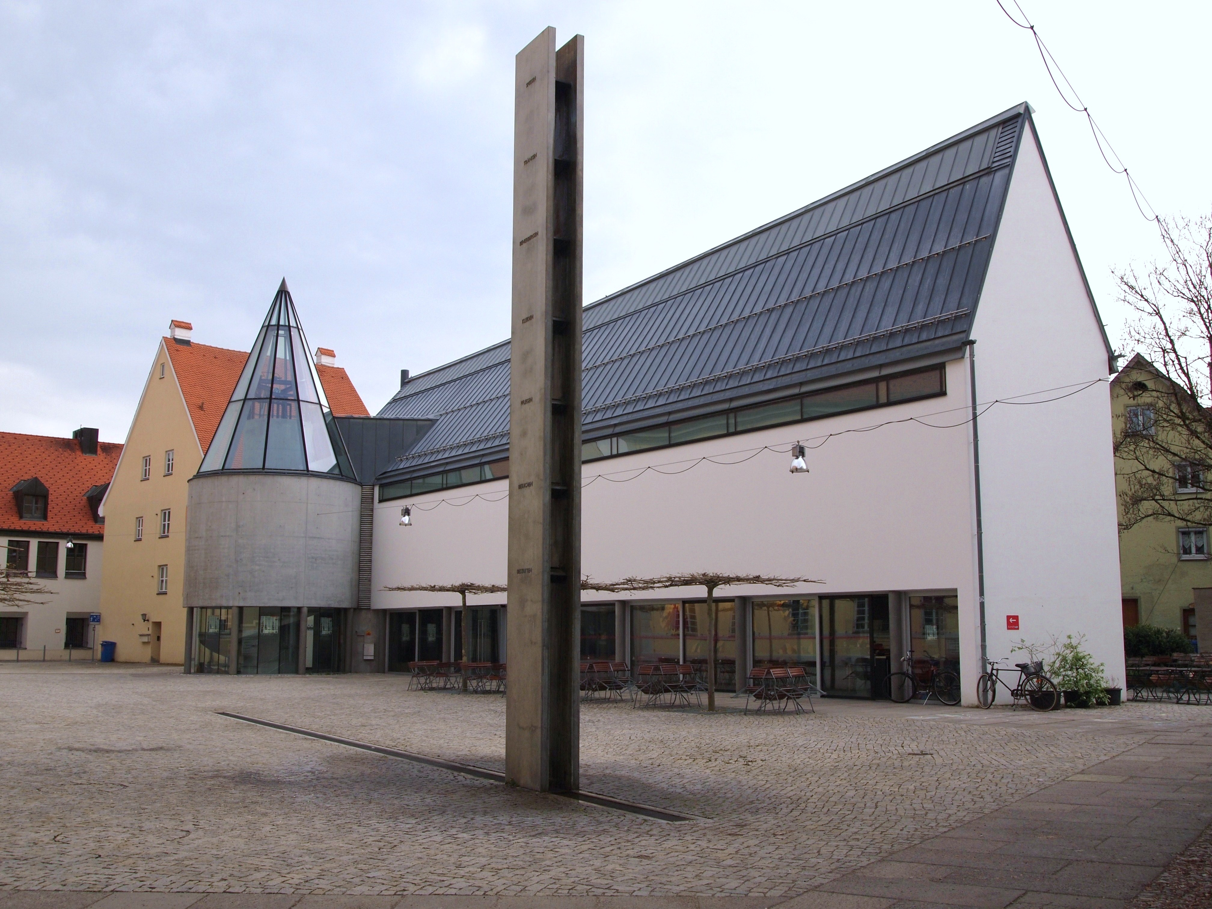 Kunsthaus Kaufbeuren, Spitaltor